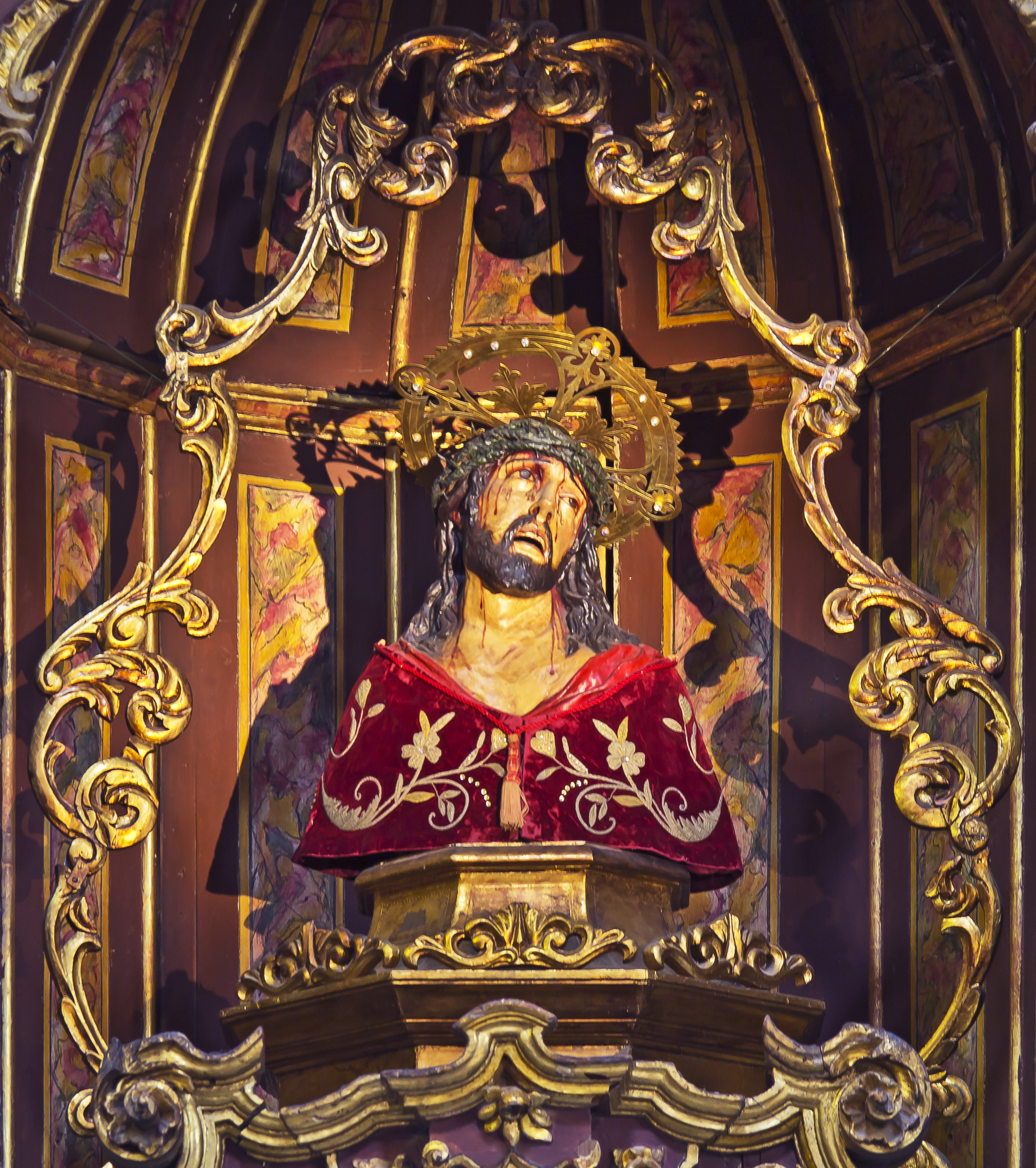 Imagen del Señor de las Tribulaciones en su retablo de la Iglesia de San Francisco de Asís en Santa Cruz de Tenerife